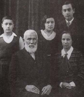 Abdürreşit İbrahim Efendi (1857-1944) ve çocukları